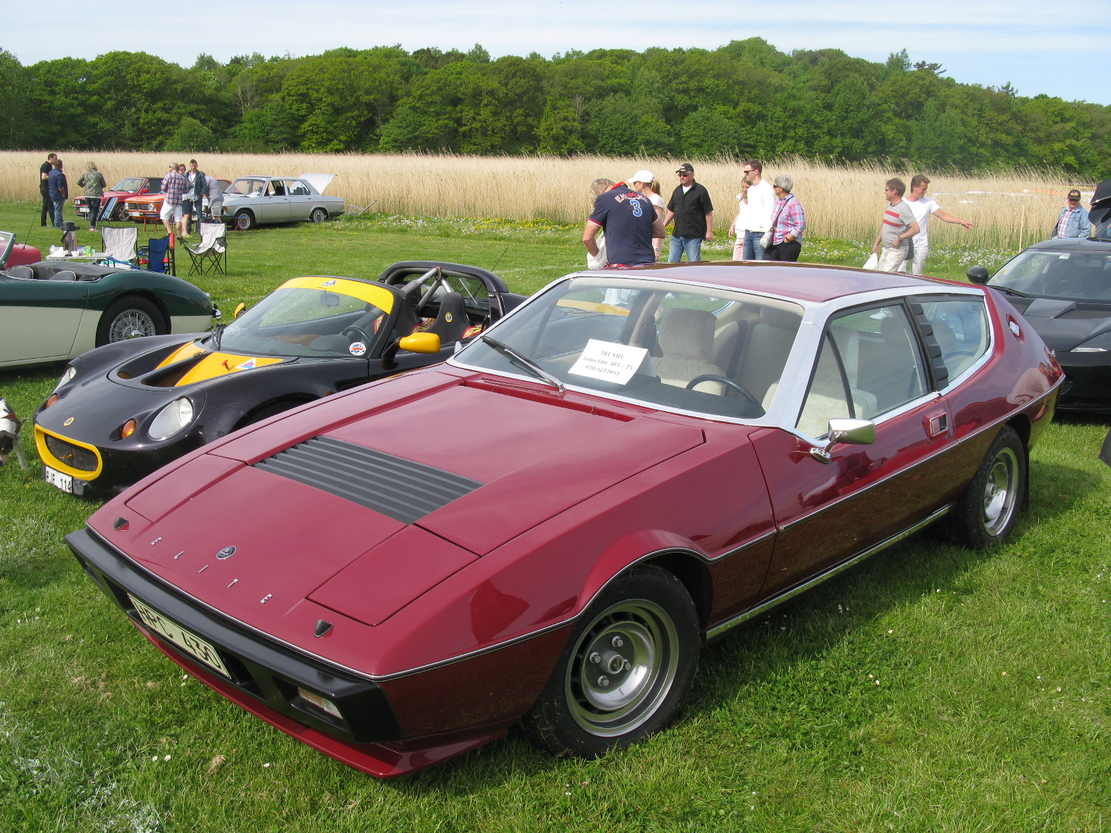 Lotus Elite